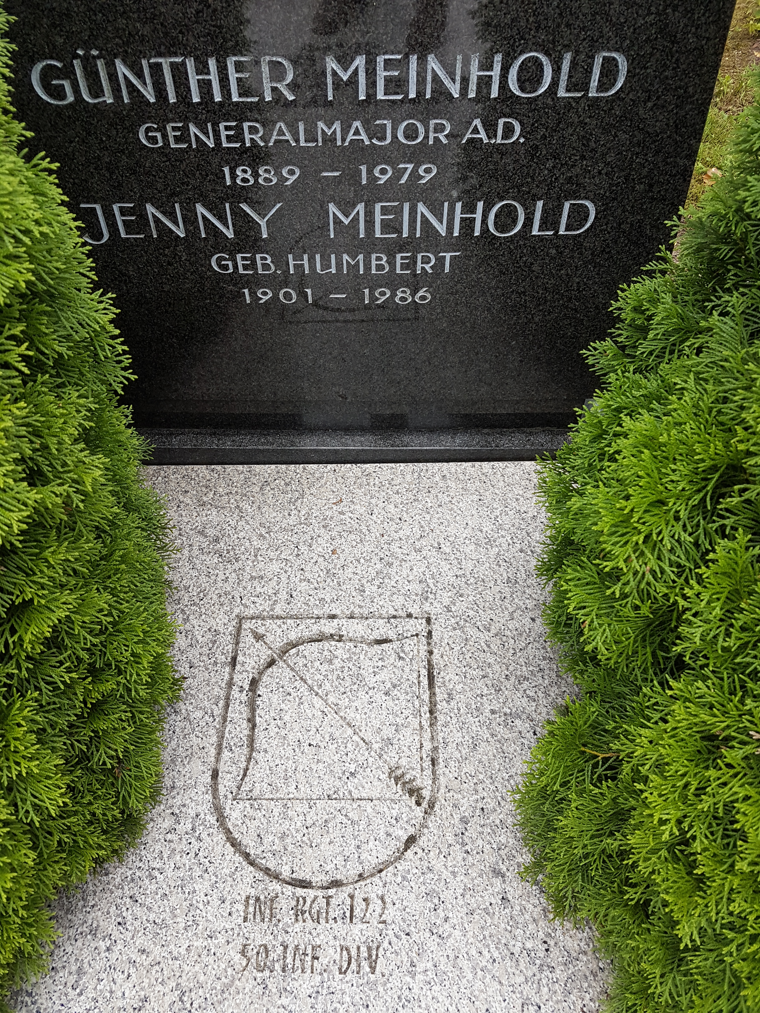 Grabstein für Günther Meinhold und dessen Ehefrau mit den Abzeichen der ihm verbundenen 50. Division.